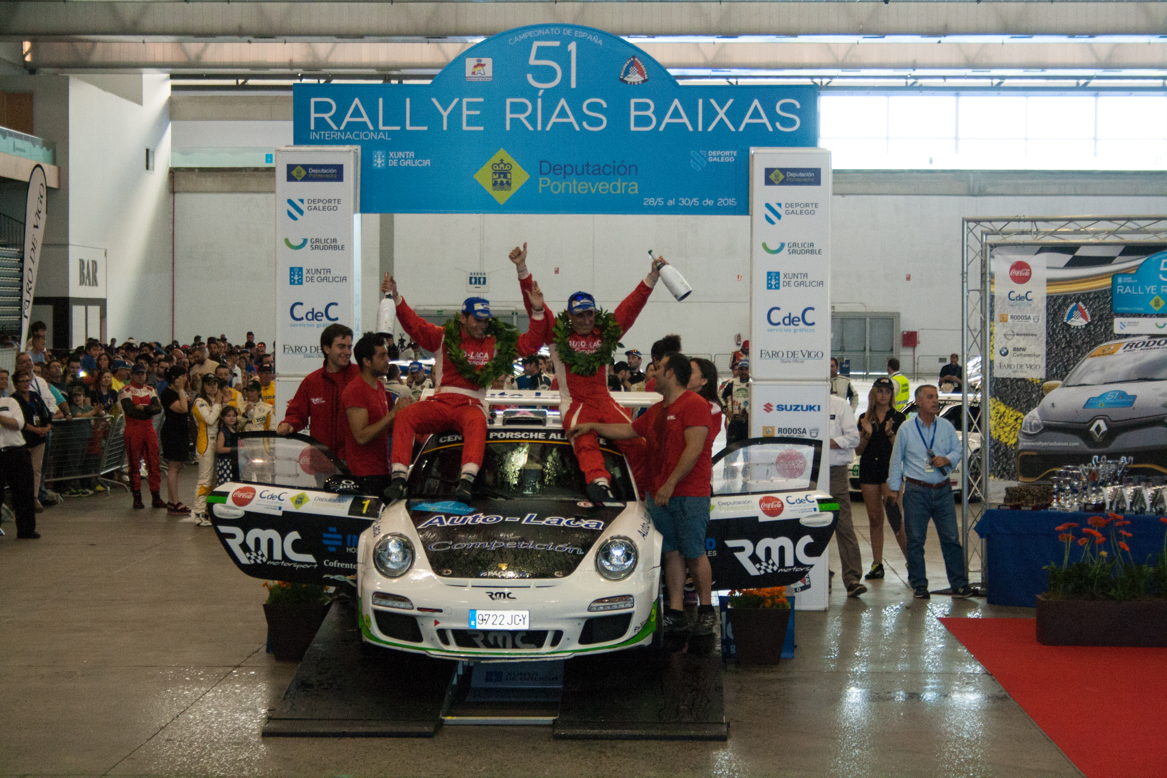 Miguel Fuster - Rallye Rías Baixas